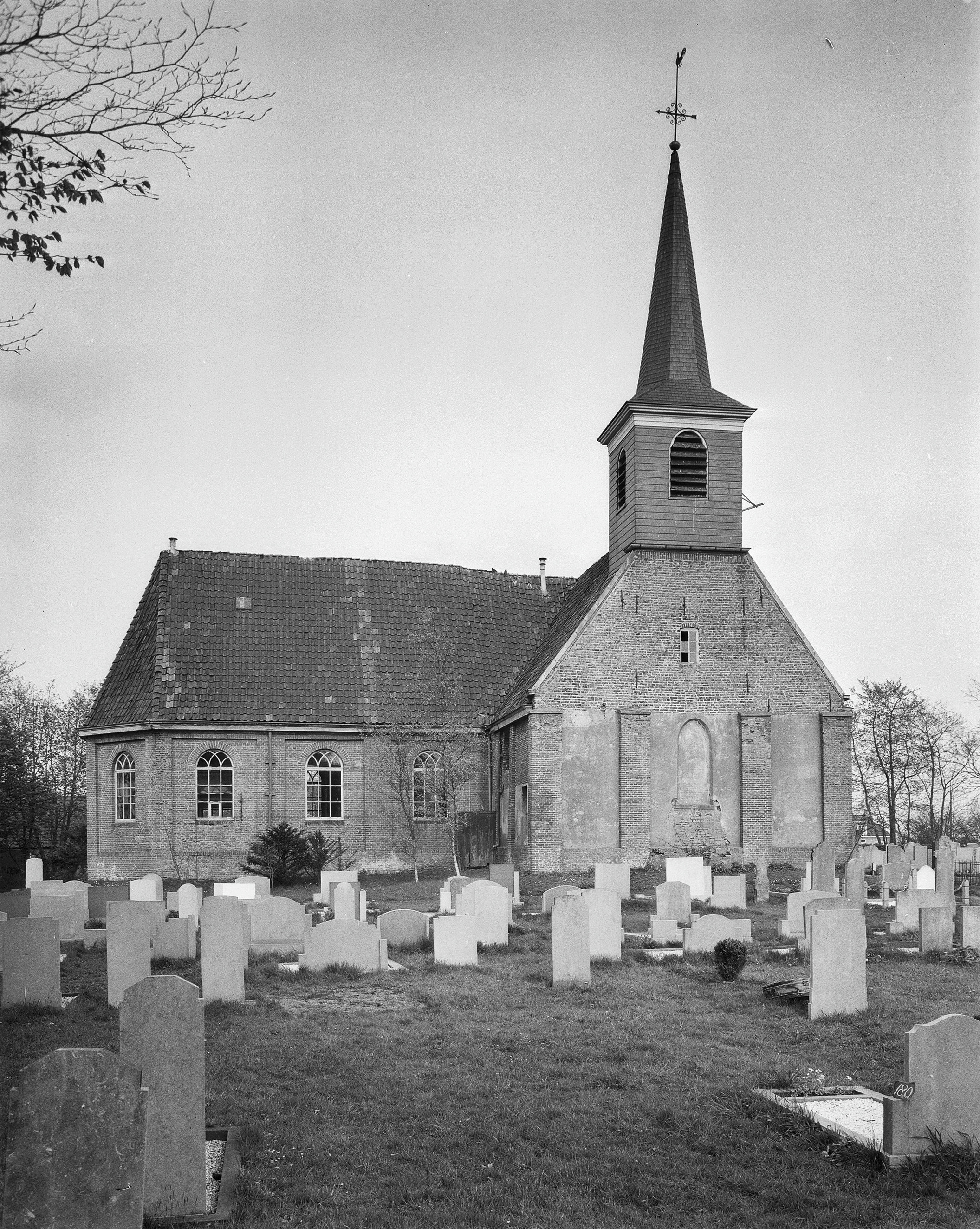 Nederlands Hervormde Kerk: exterieur naar het oosten